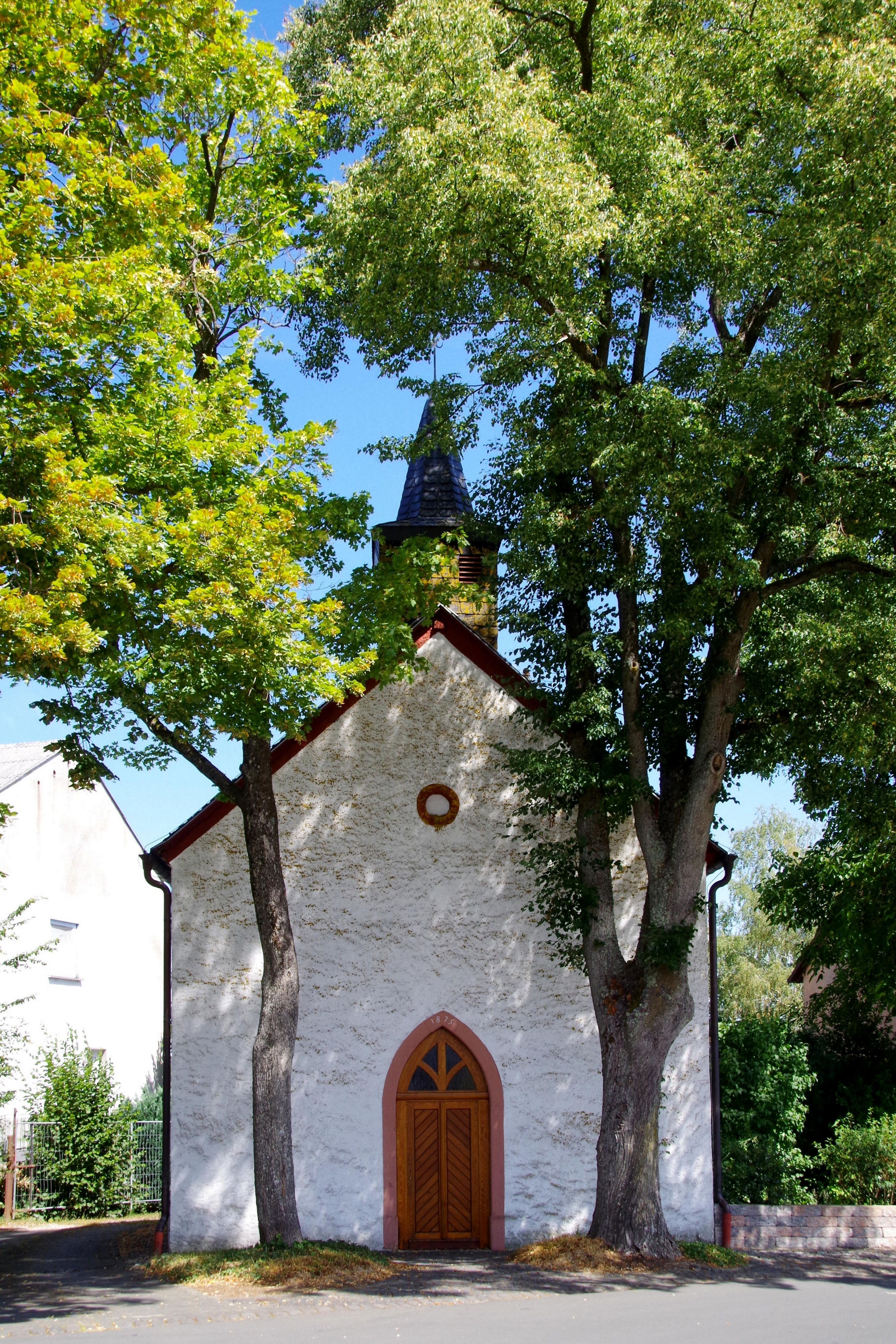 St. Peter und Paul (Senscheid) von Südwesten mit Portal und Dachreiter